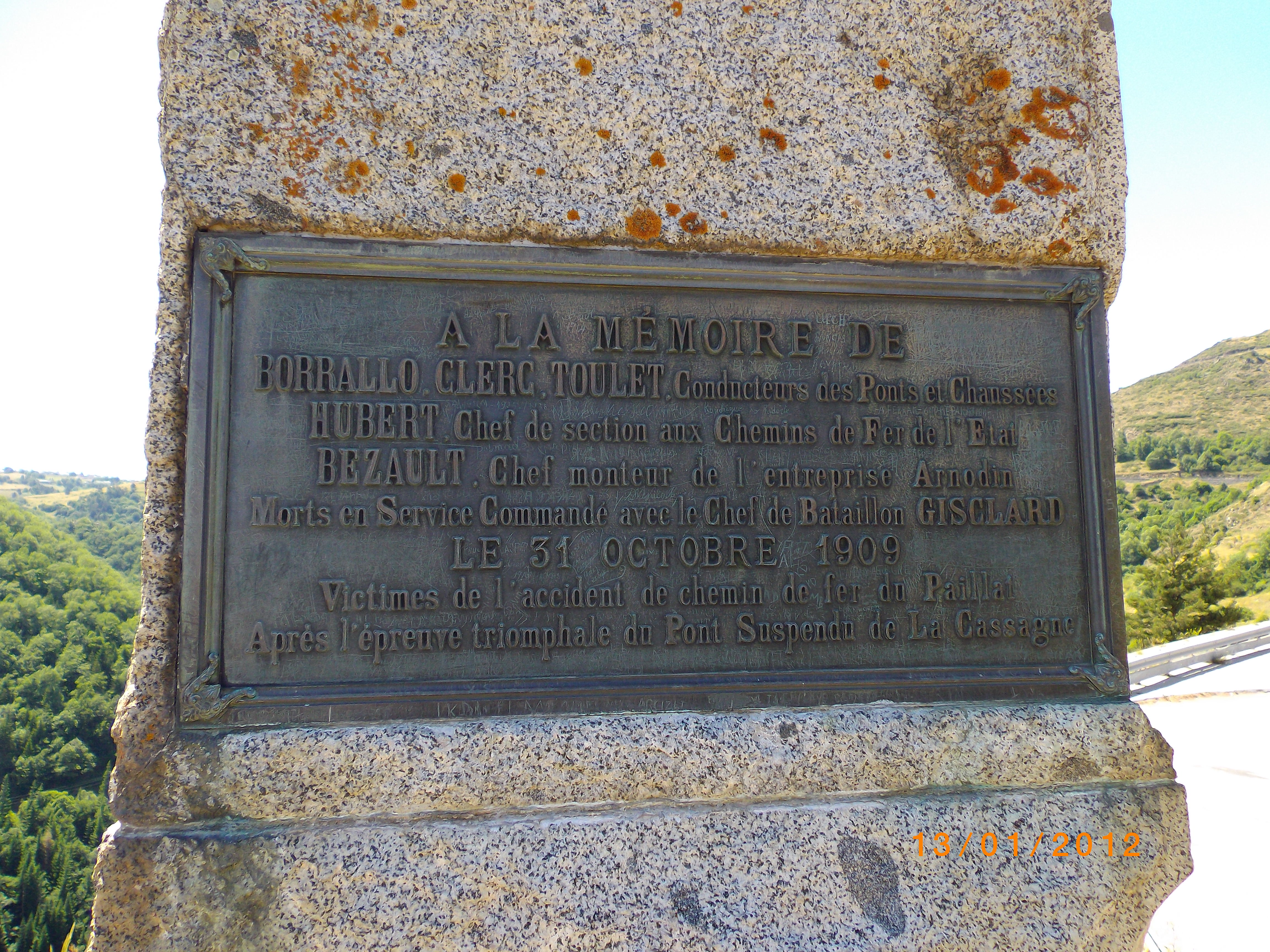 Plaque commémorative du Pont-Gisclard.